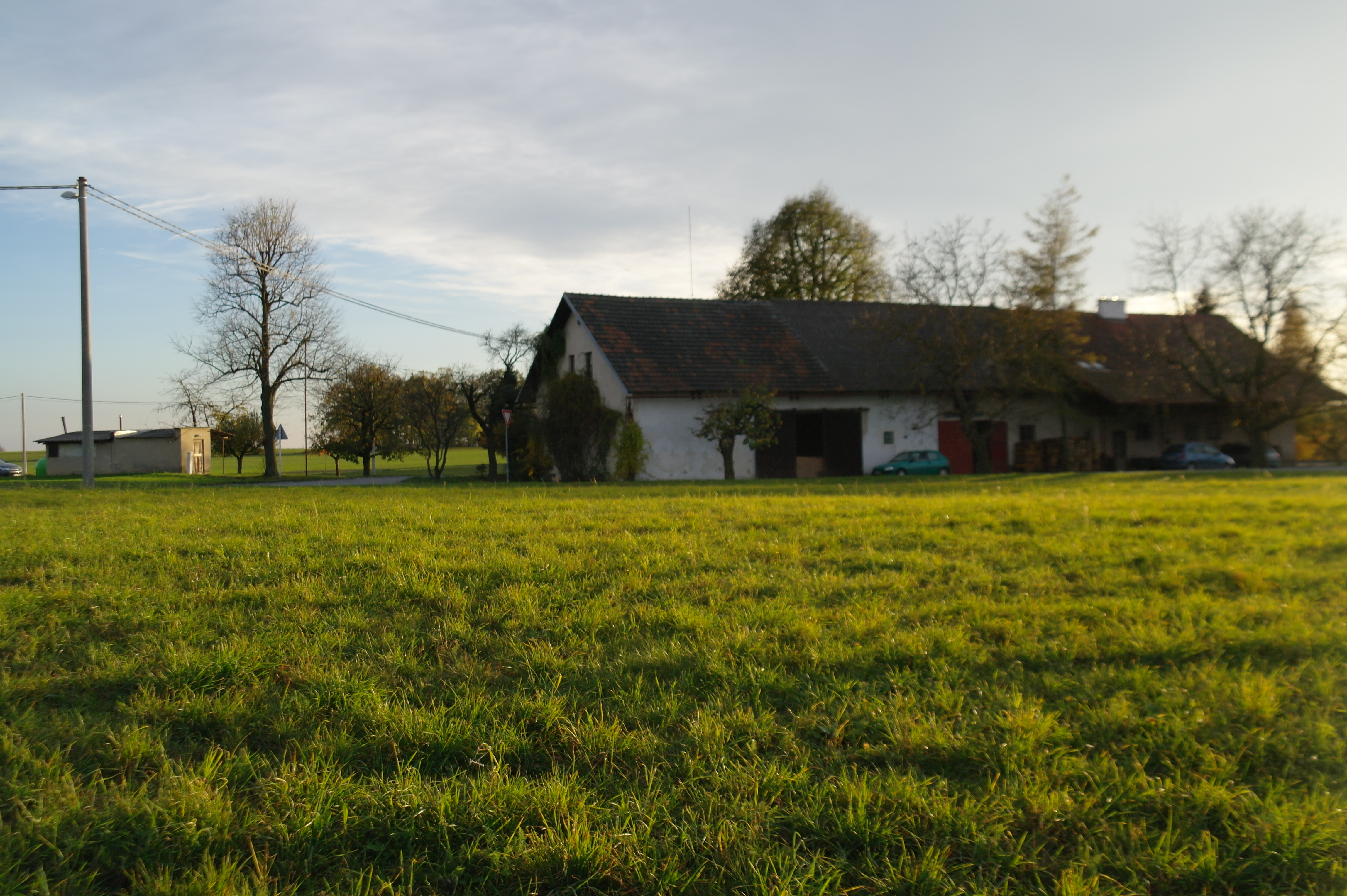 Stavení ve vesnici Roudné v Královéhradeckém kraji Project: Fotíme Česko